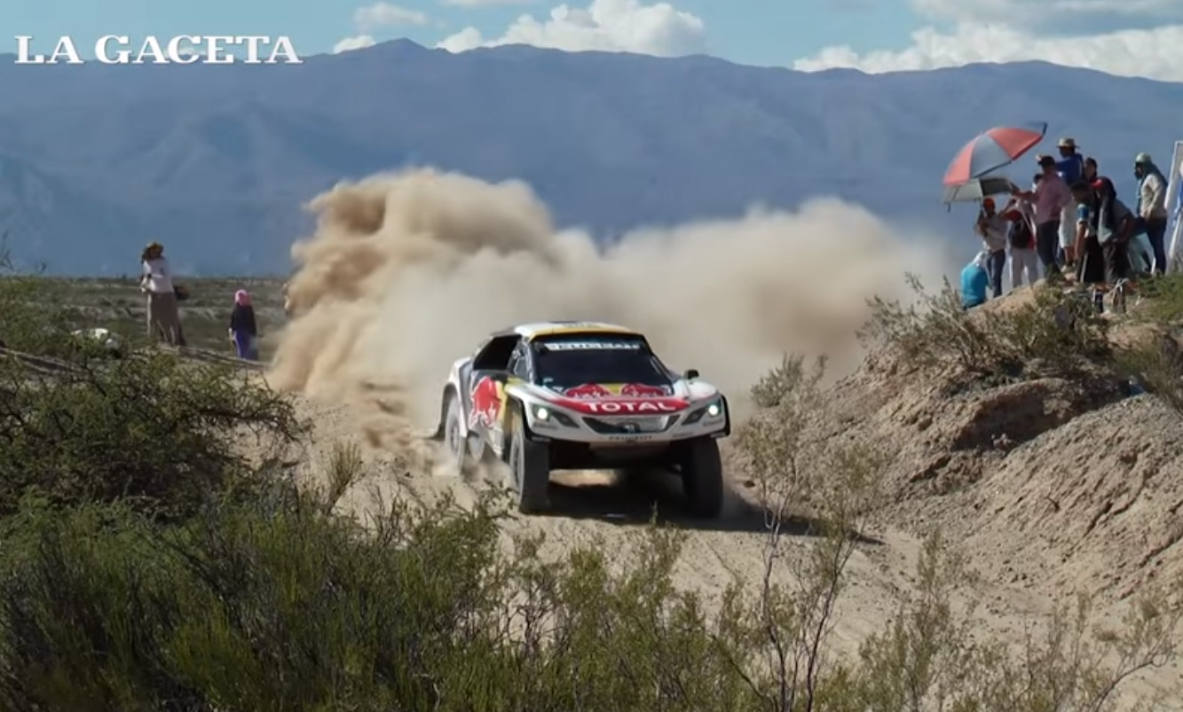 Dakar 2017. Tucumán (Argentina). Captura de La Gaceta (Mirá las máquinas del Dakar en su paso por Tucumán). Carlos Sainz